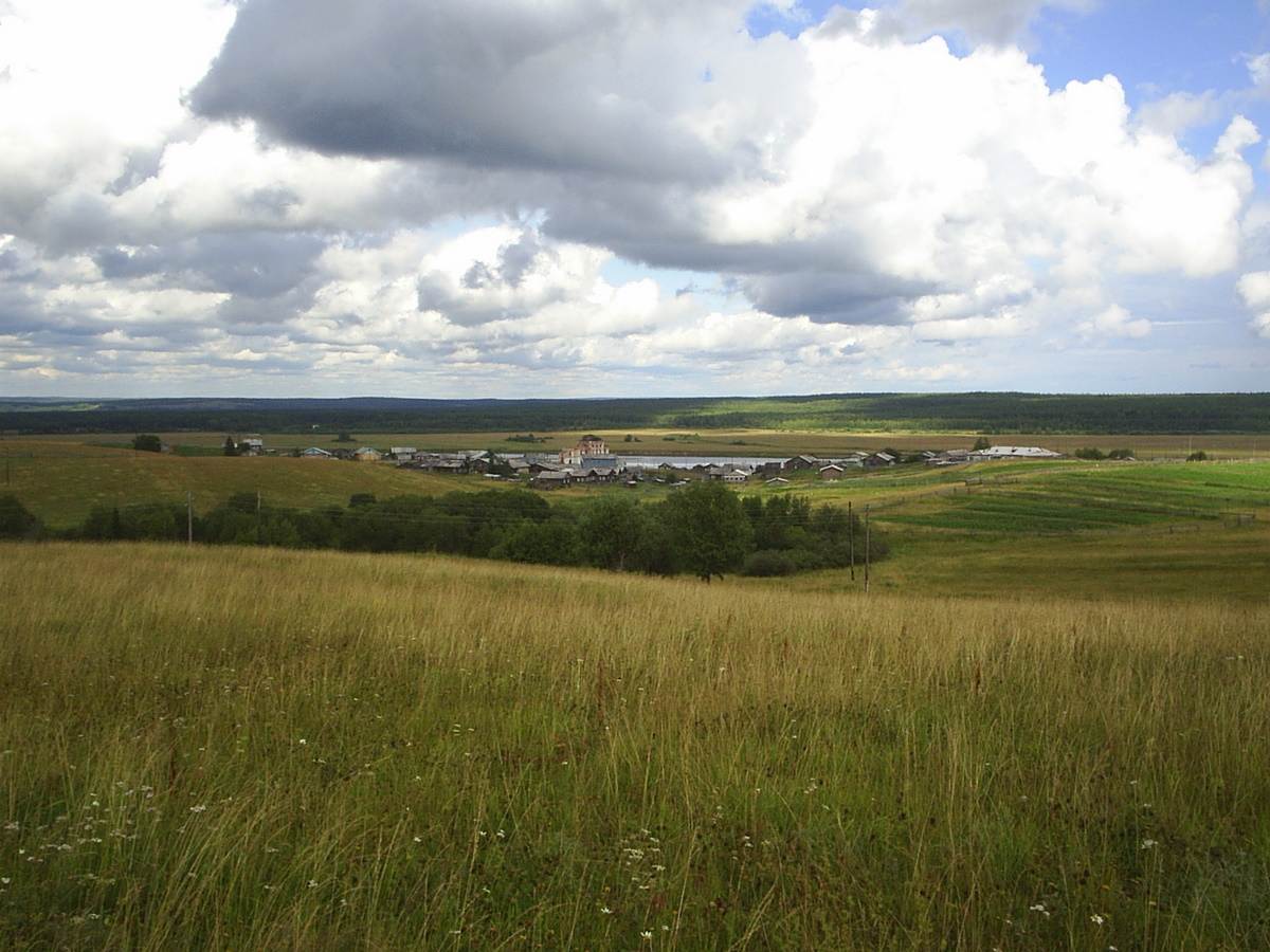 Глотово